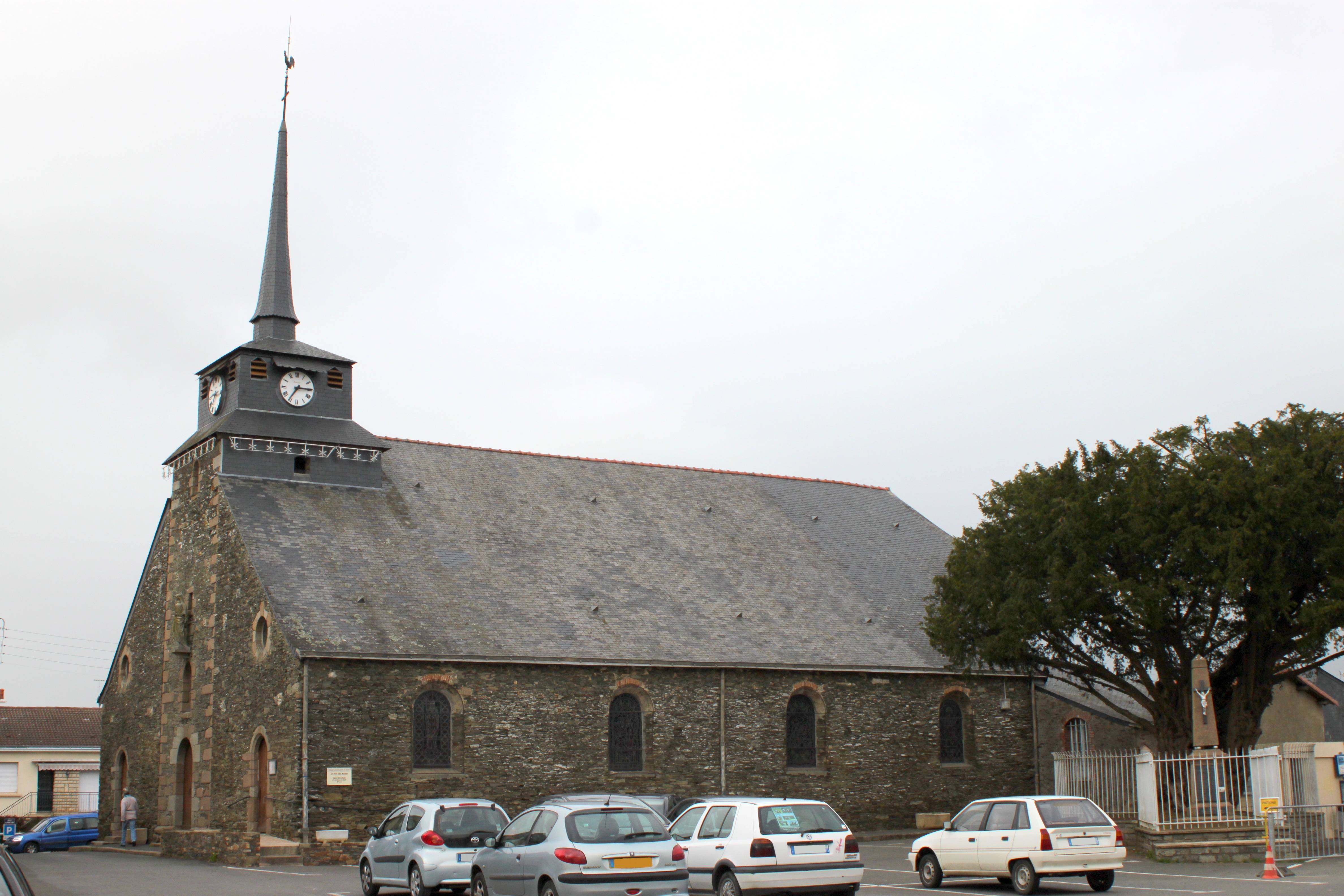 Église Notre-Dame, XVIII°, Fr-49-La Chapelle-du-Genêt.